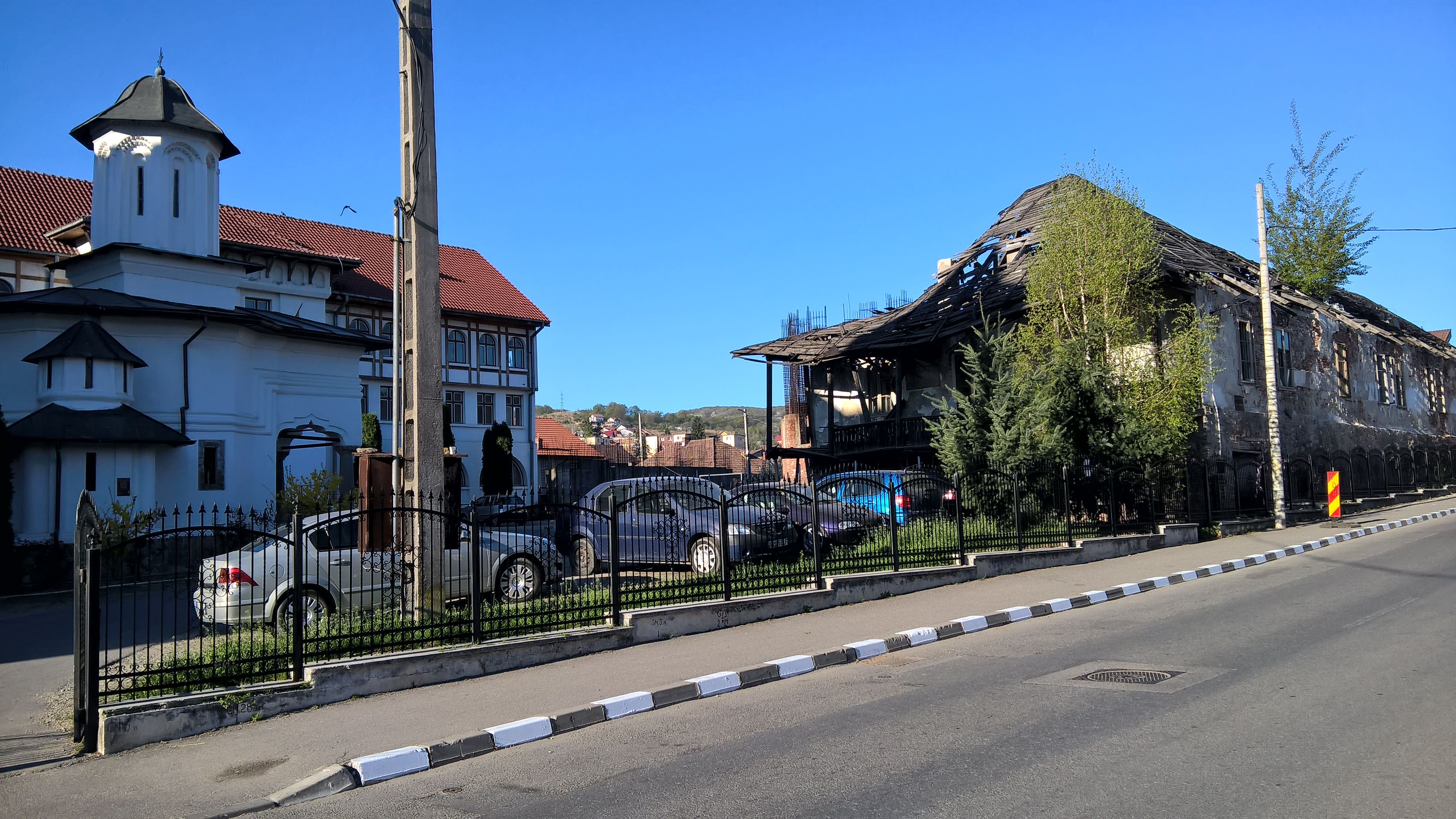 Ansamblul fostului schit Inătești - municipiul Râmnicu Vâlcea, Str. Antim Ivireanu 17